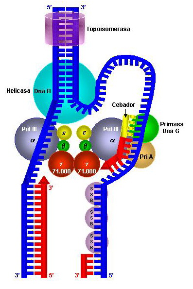 enzimas que intervienen en la replicación en E. Coli